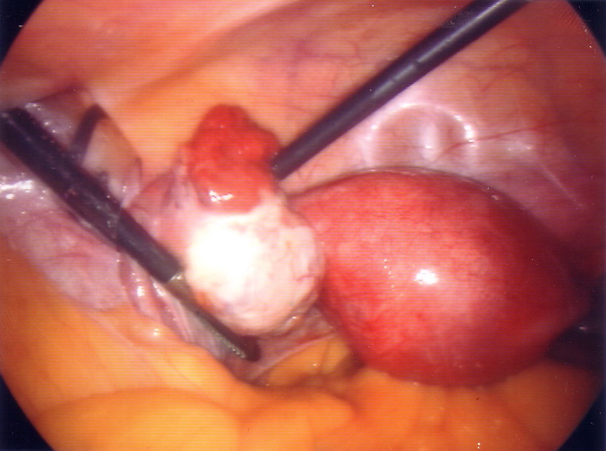 Laparoscopie. Uterus, linker tuba met fimbriele uiteinde, linker ovarium.